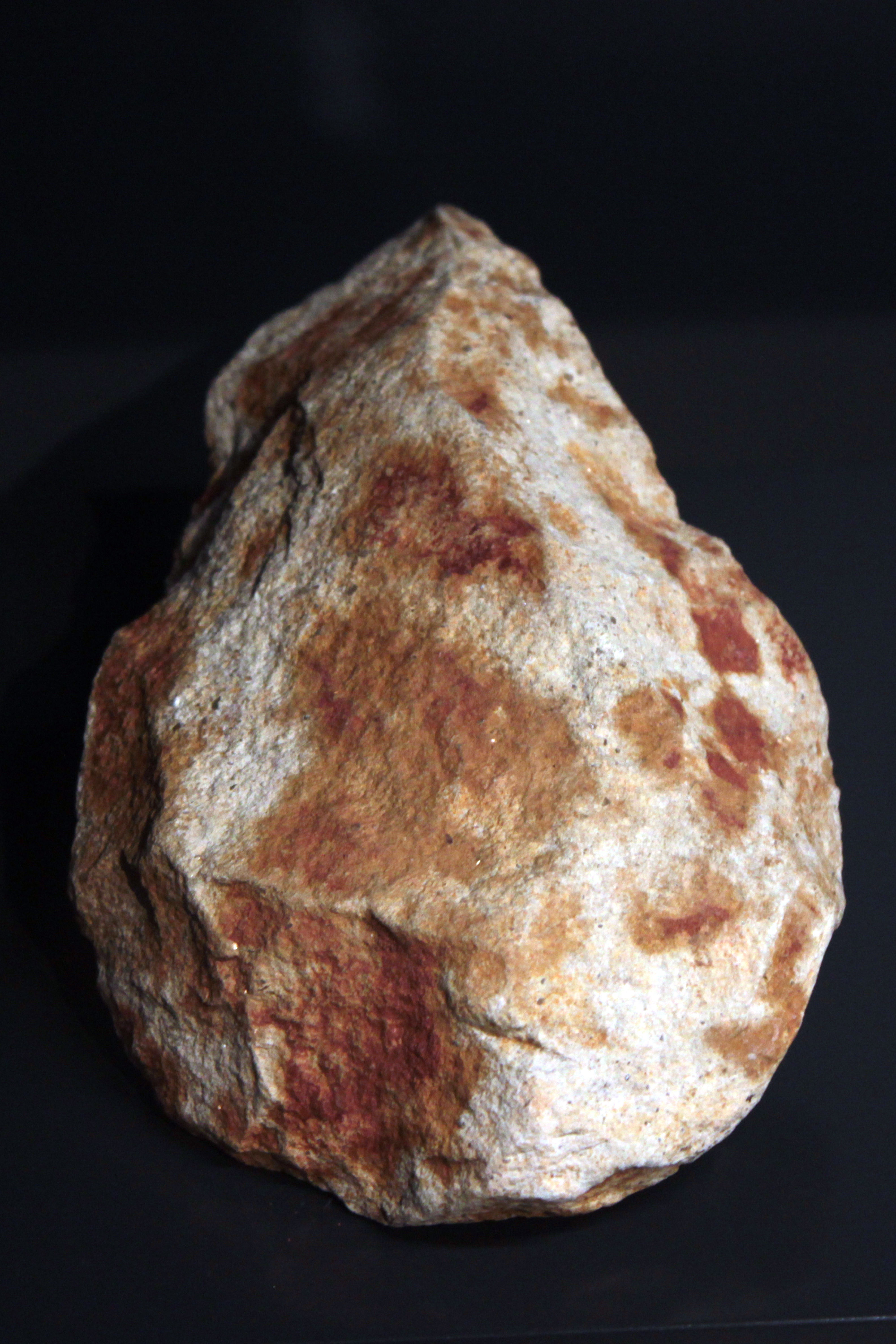 Bifaz del Paleolítico inferior localizado en el yacimiento de El Chaparral de Los Barrios. Museo municipal de Algeciras, Andalucía, España.